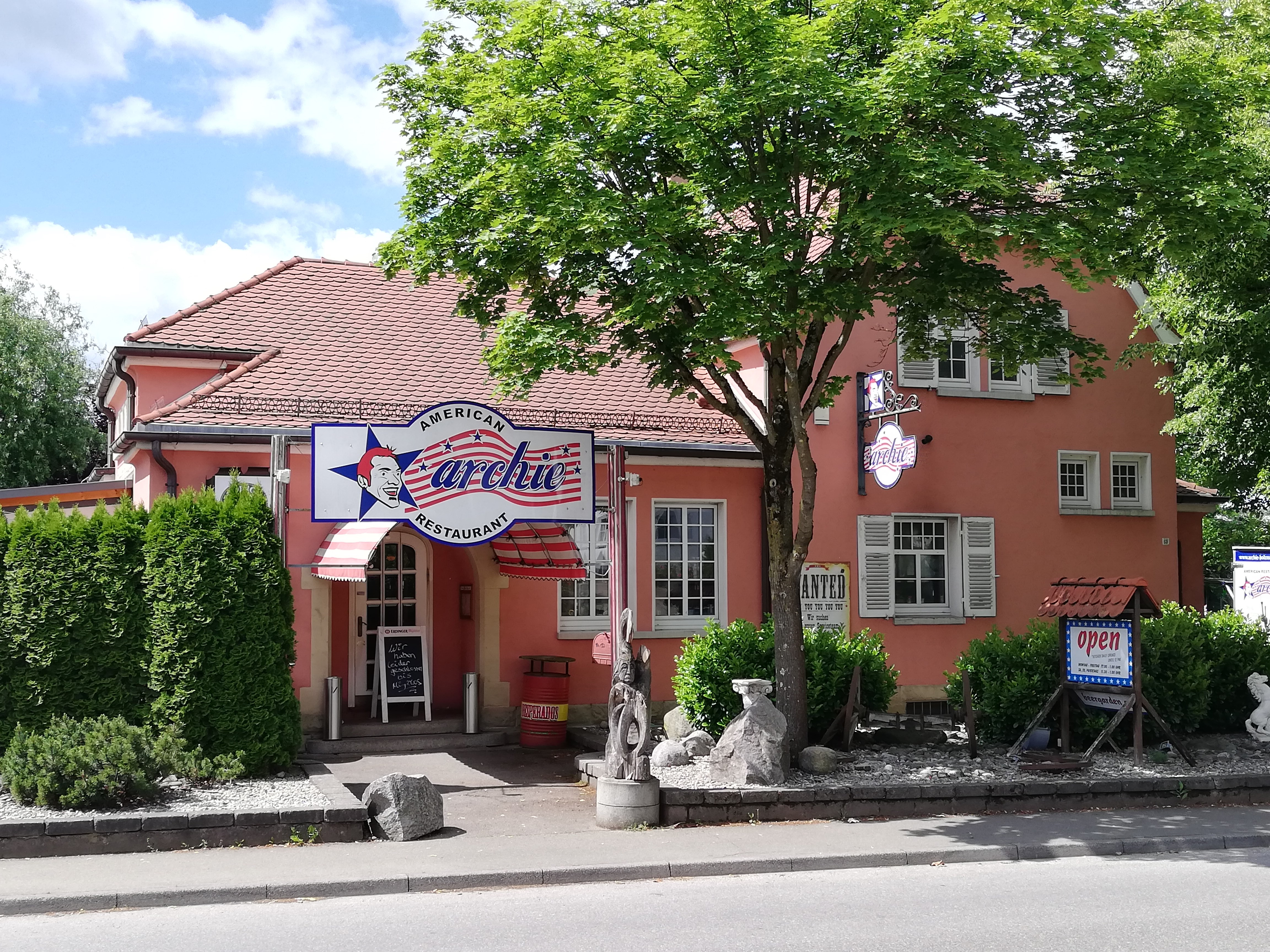 Ehemaliger Bahnhof Holzmaden